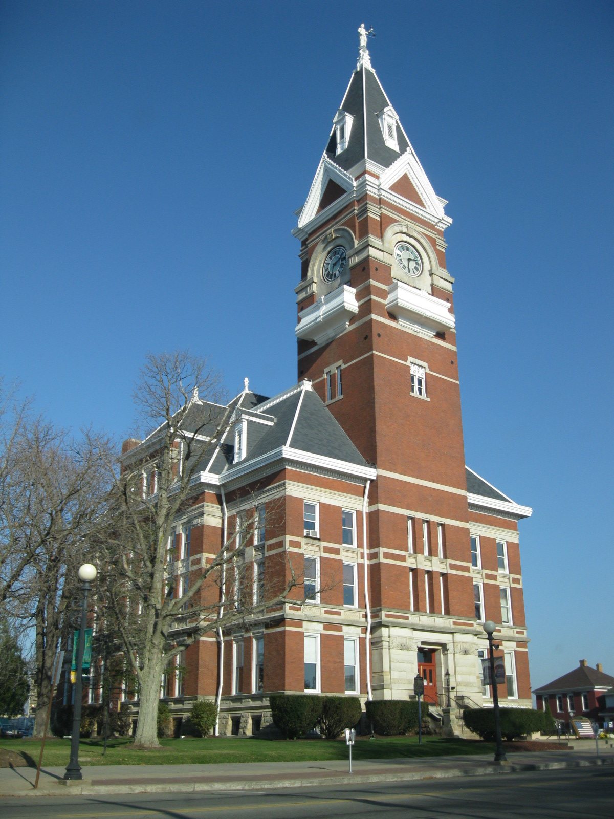 Clarion, Pennsylvania